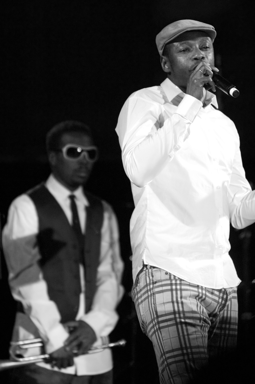 Roy Hargrove's RH Factor invite MC Solaar, Festival Jazz des Cinq Continents, Marseille Juillet 2009